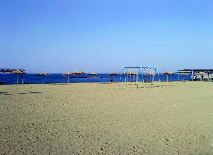 отпуск на озере Тудакуль